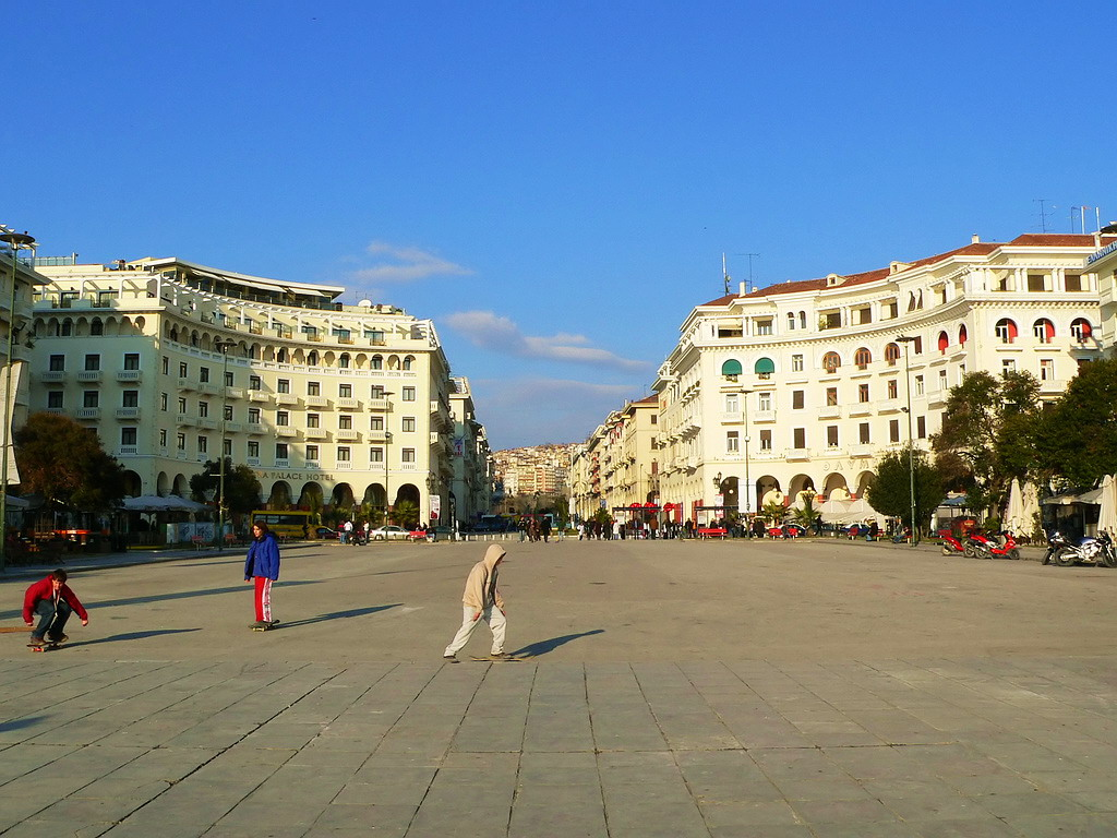 Aristotelous Square in Thessaloniki.